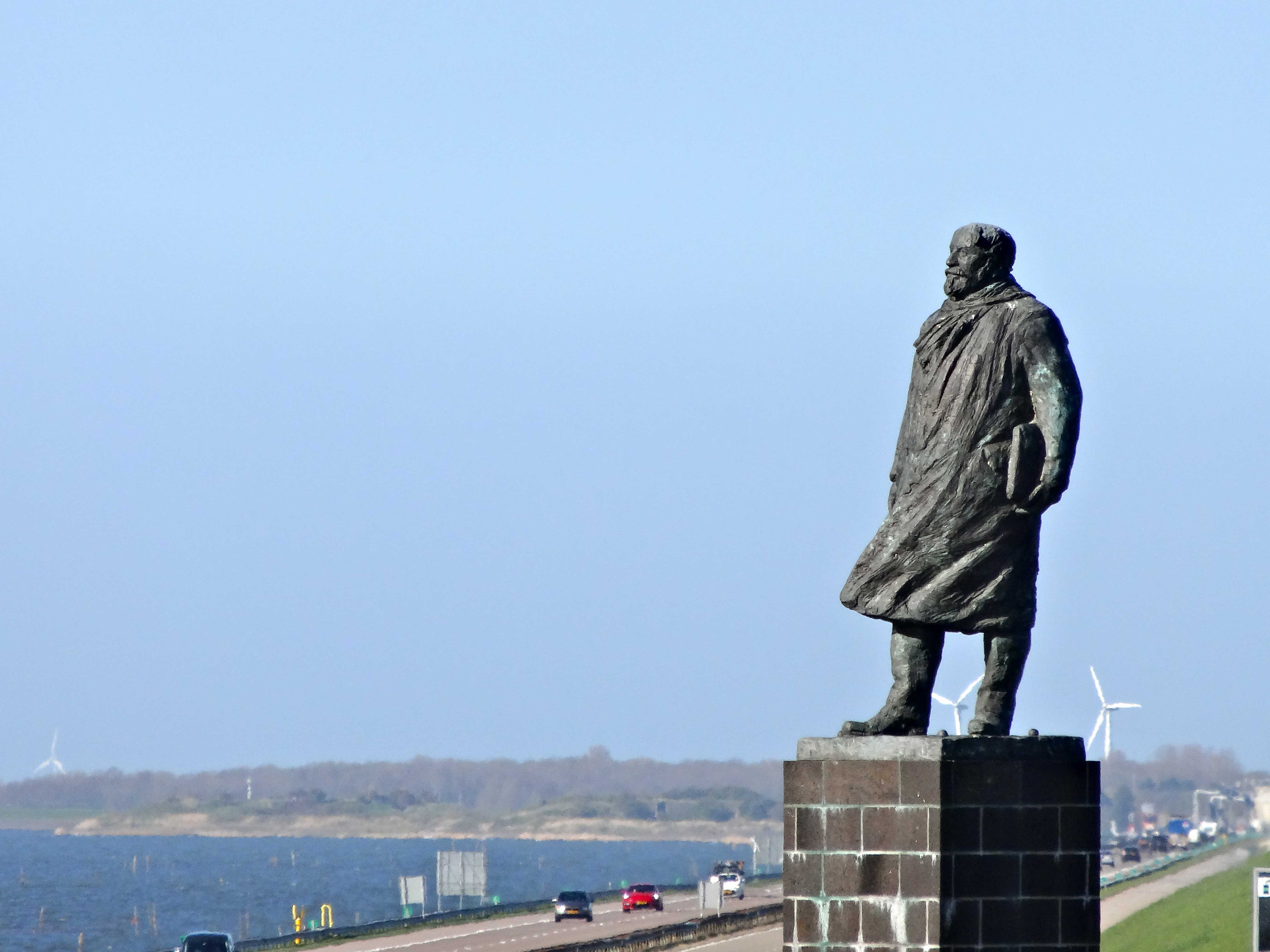 standbeeld van ir. Cornelis Lely op de Afsluitdijk door Mari Andriessen (1897–1979) Alternative names Mari Silvester Andriessen; Marie Andriessen; Marie Silvester AndriessenDescriptionDutch sculptorDate of birth/death 4 December 1897 7 December 1979 Location of birth/death Haarlem HaarlemWork location Netherlands Authority control : Q844964 VIAF: 40171845 ISNI: 0000 0000 6676 7870 ULAN: 500057343 LCCN: n79145784 GND: 11864520X WorldCat creator QS:P170,Q844964